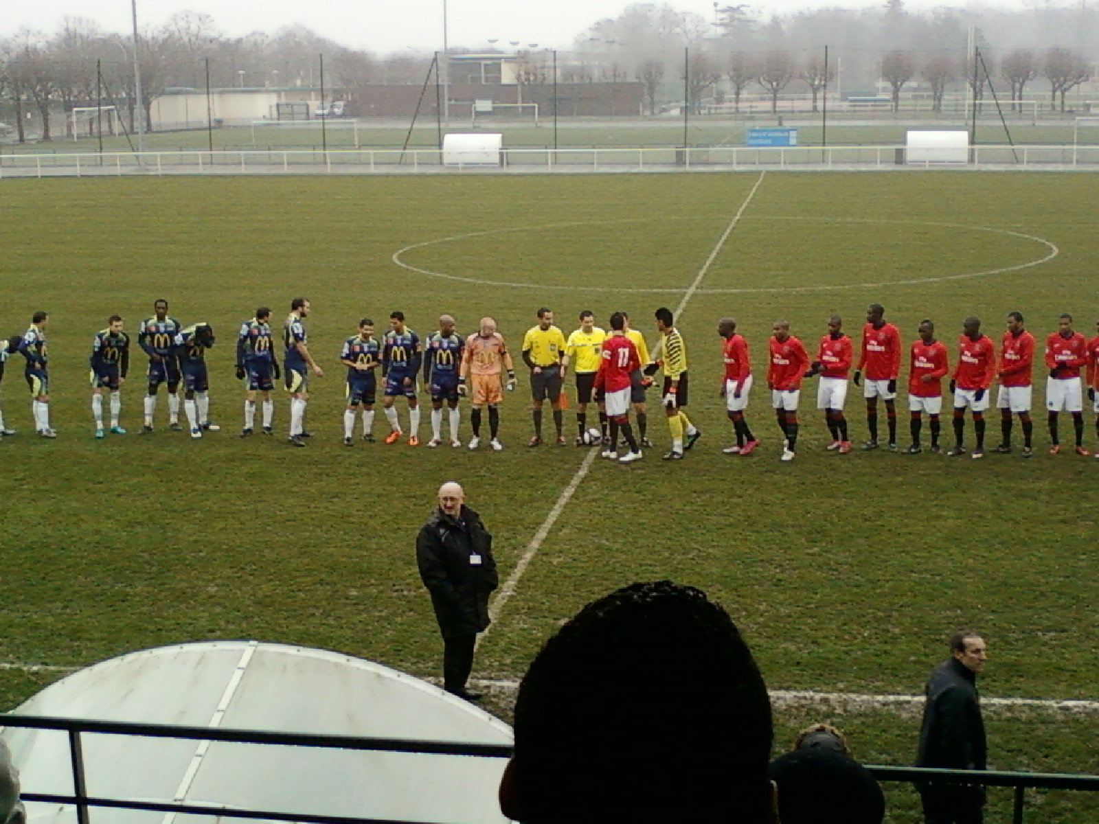 Présentation des équipes lors du match PSG B-Villefranche du 19 février 2011